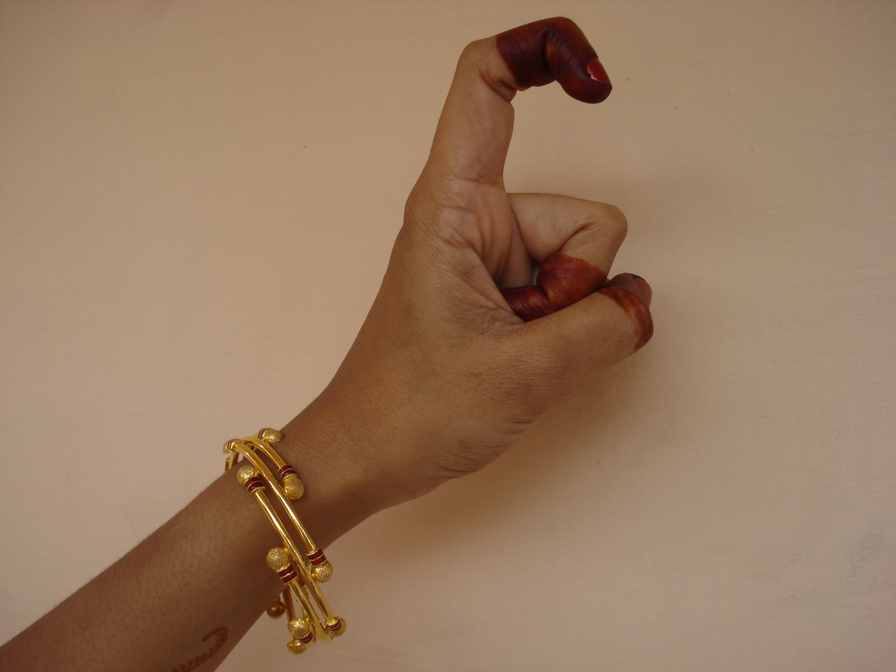 താമ്രചൂഡഹസ്തം